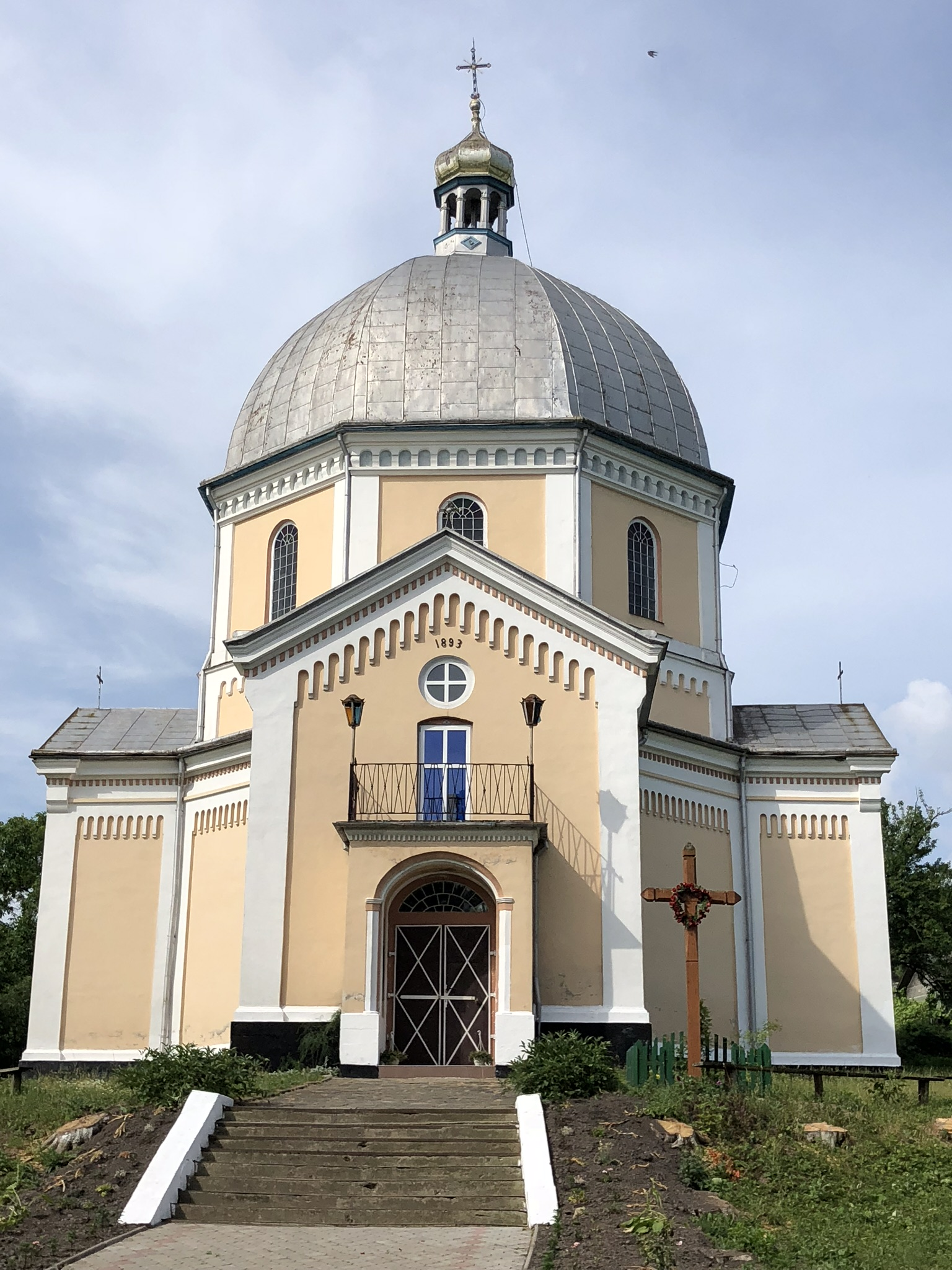 На фото храм святого Архистратига Михаїла в селі Завалів. Фото зроблене 10 червня 2018 року